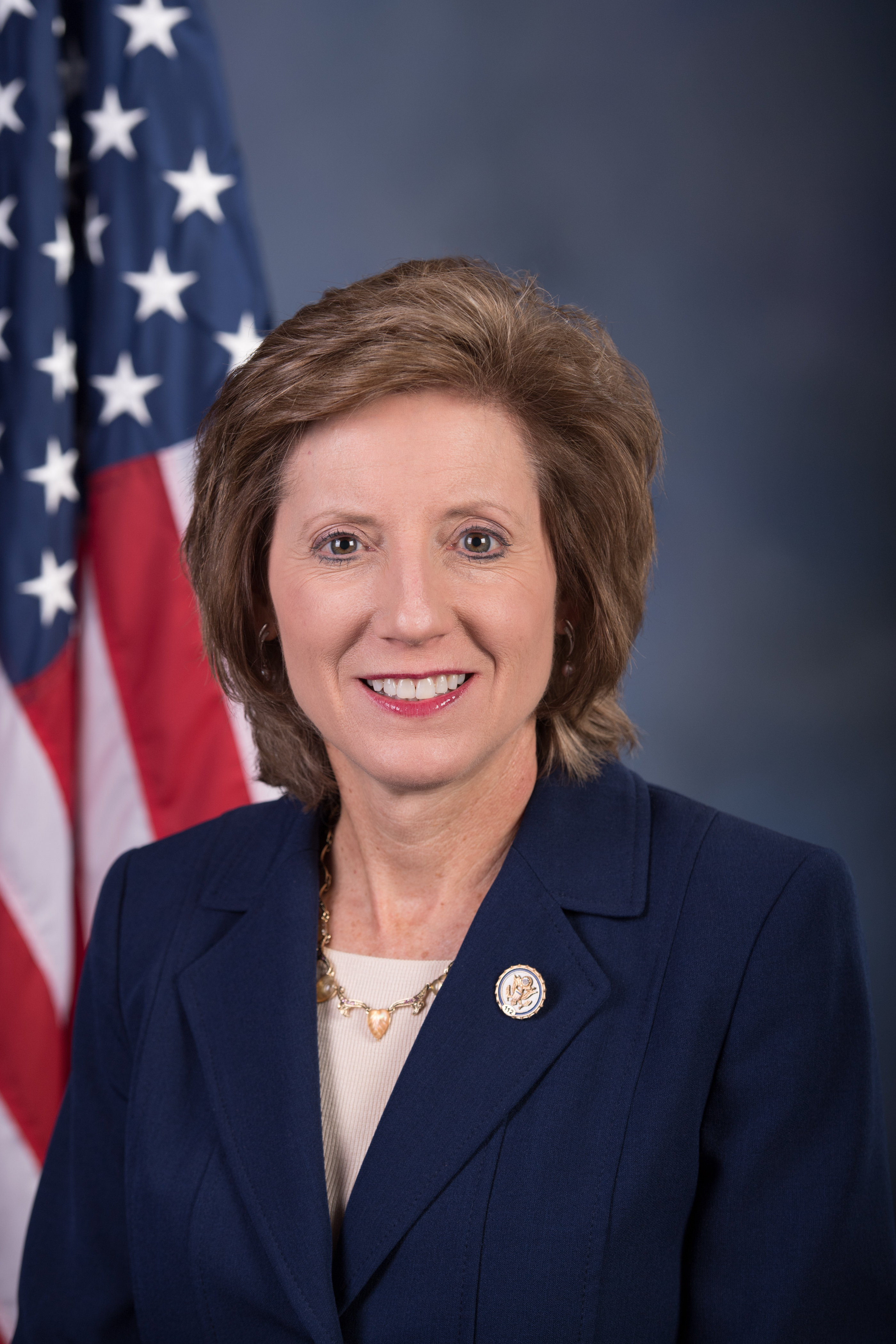 US Rep Vicky Hartzler